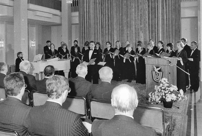 ADN-ZB Schindler-2.11.88-mx-Berlin: Gedenkveranstaltung - Dem Gedenken an den 50. Jahrestag der faschistischen Progromnacht war eine Veranstaltung der CDU gewidmet. Das festliche Programm gestaltete der Leipziger Synagogalchor, der Chor des Verbandes der Jüdischen Gemeinden in der DDR.